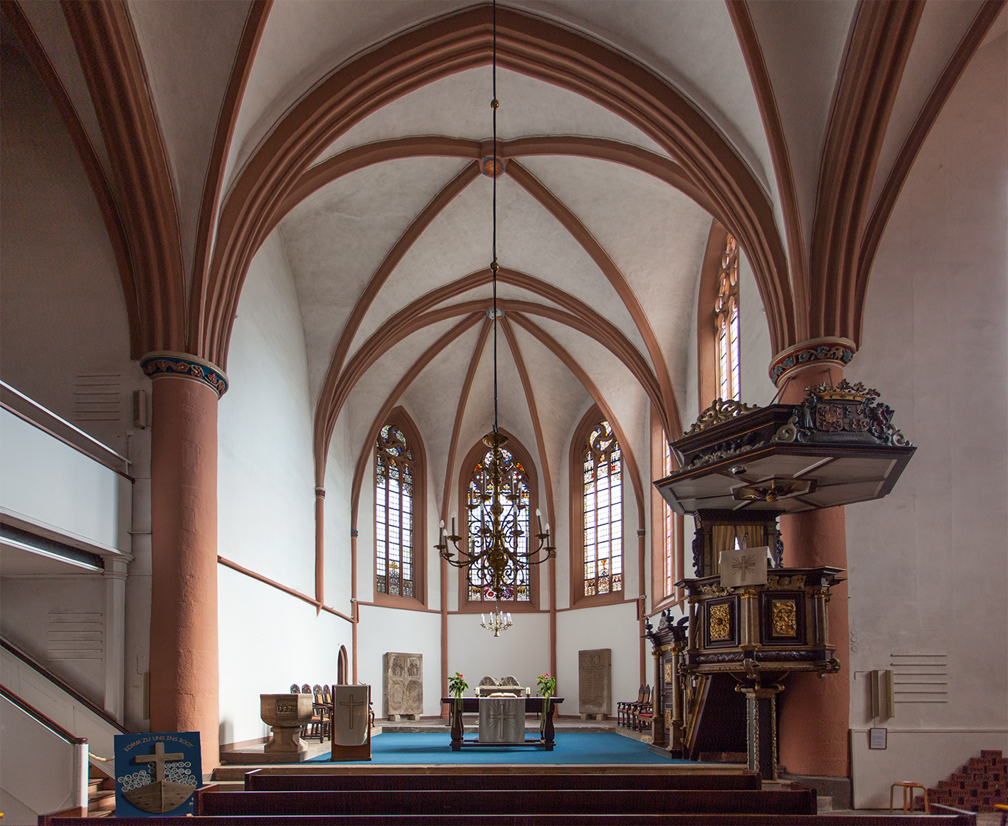 Innenraum der Klosterkirche Blomberg This is the photograph of an architectural monument. It is part of the list of cultural monuments of Blomberg, no. 37